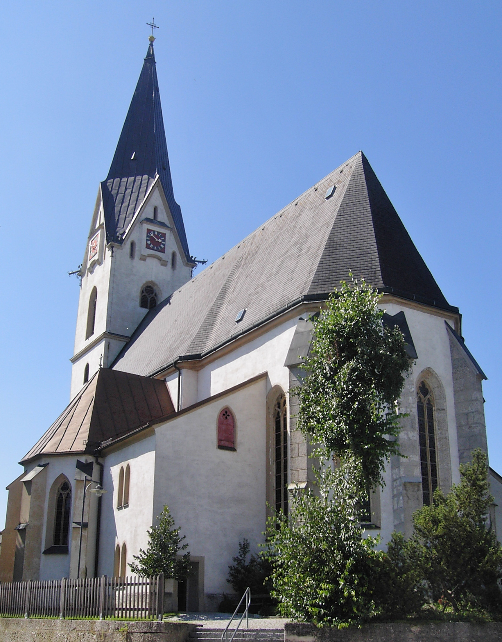 Aschach an der Steyr Hauptstraße Pfarrkirche, Ansicht von Osten